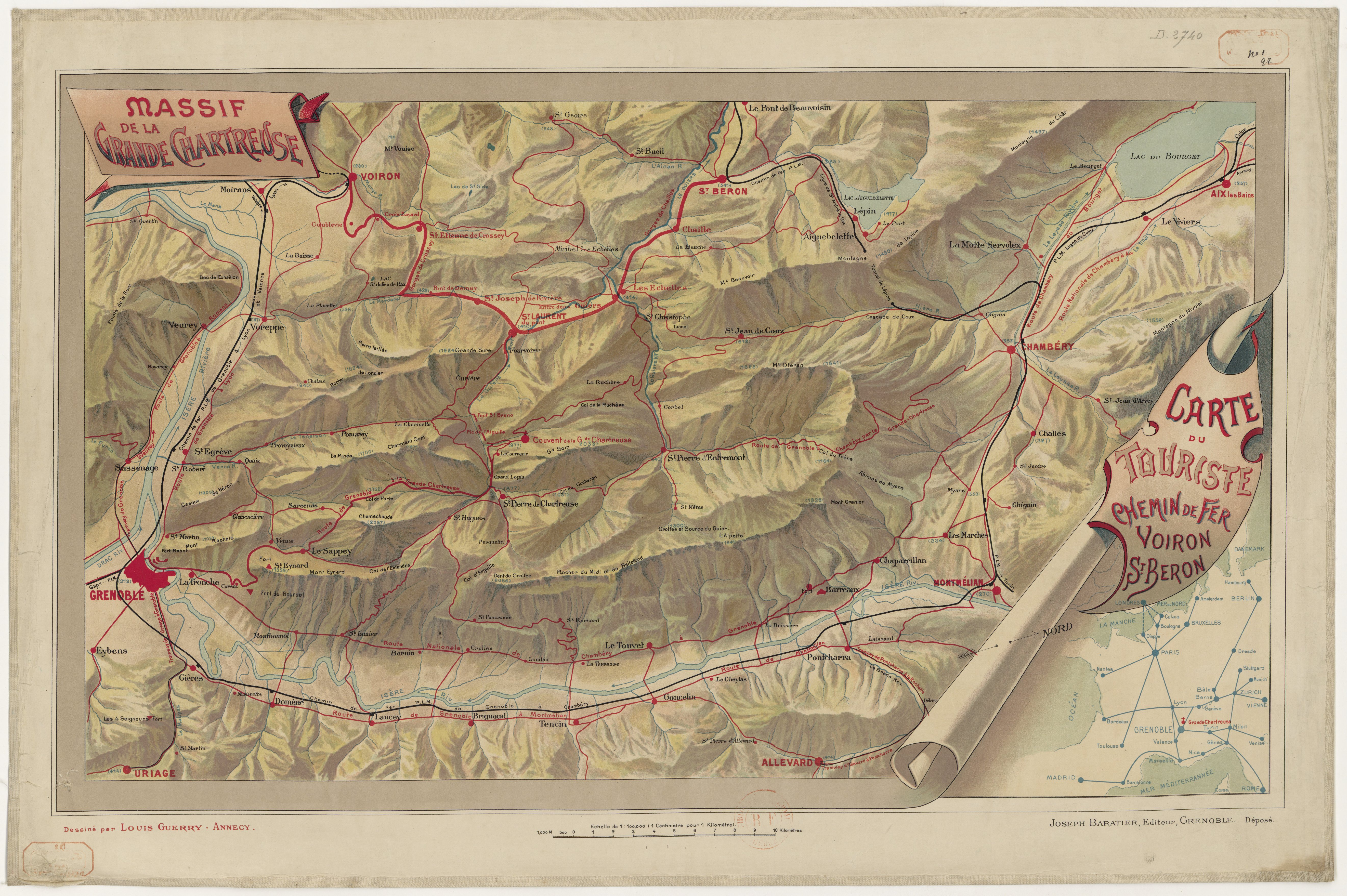 Carte touristique du massif de la Grande Chartreuse en 1897, dressée pour le chemin de fer Voiron - Saint-Béron, par Louis Guerry.